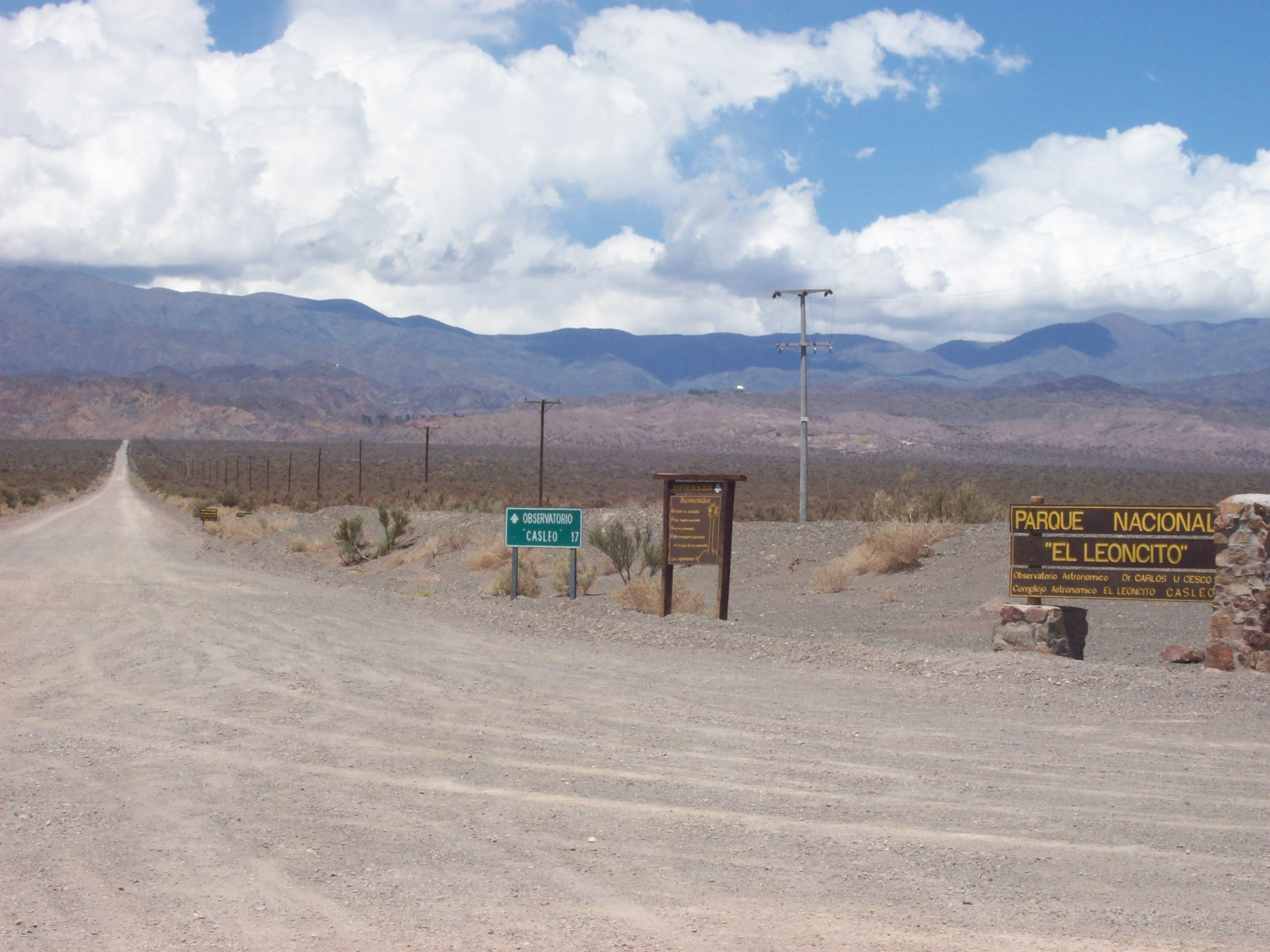 Acceso al Parque Nacional El Leoncito en la intersección con la Ruta Nacional 149 en el Departamento Calingasta, Provincia de San Juan, Argentina. Al fondo, Sierra del Tontal, que es parte de la Precordillera.